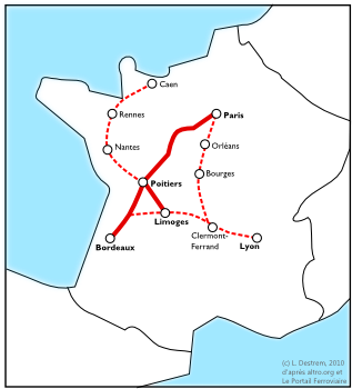 Carte du projet Transline, d'après l'association Altro et Le portail ferroviaire de G. Bertrand.